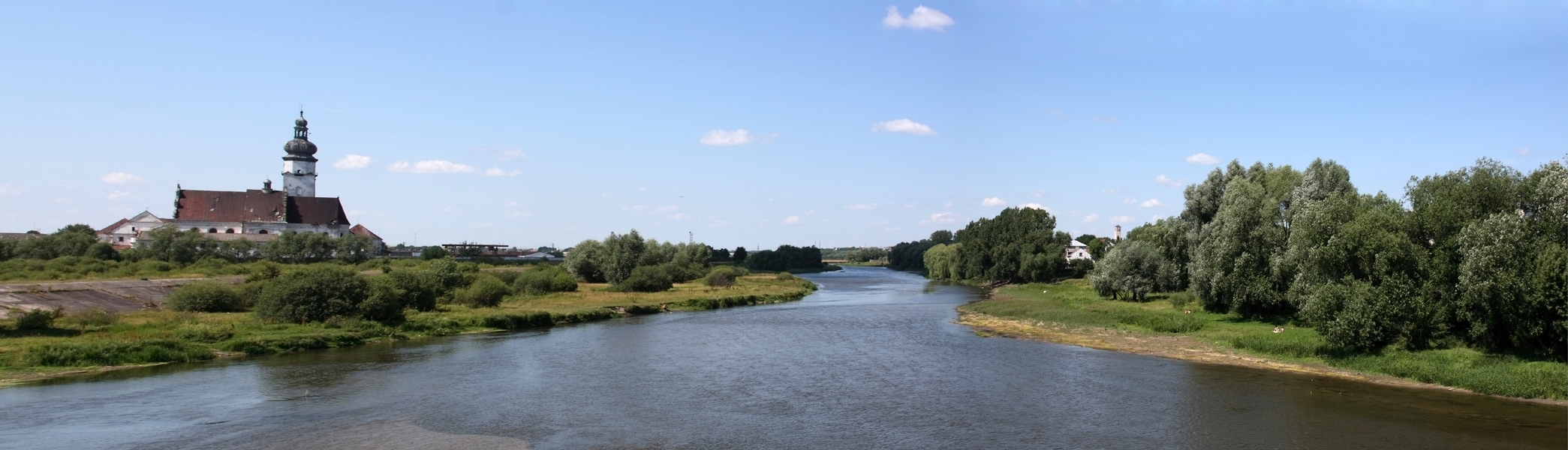 Река Западный Буг в Сокале